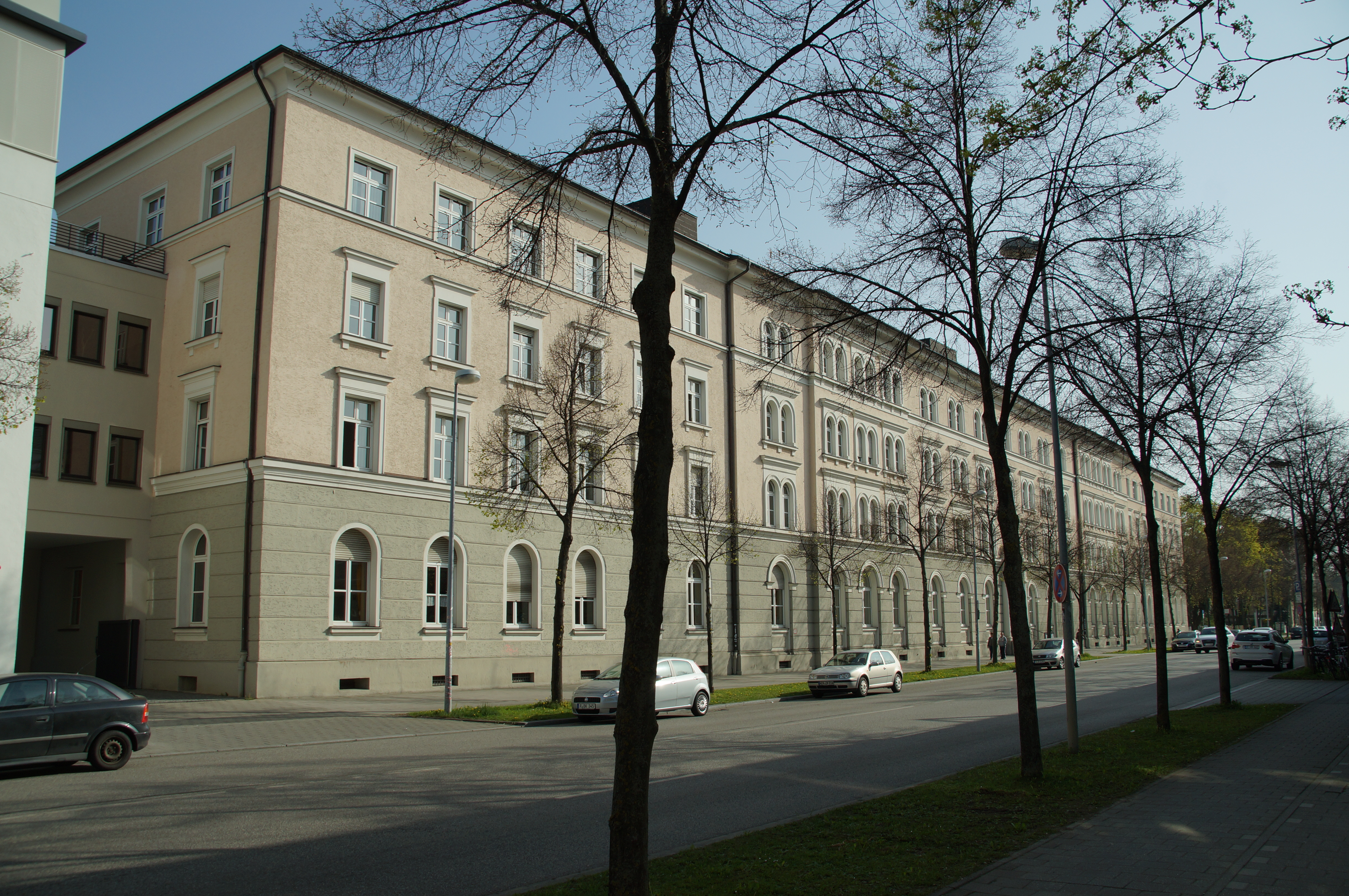 Ehemaliges Verwaltungsgebäude der Bundesbahndirektion, viergeschossiger langgestreckter Walmdachbau mit rückwärtigen Flügeln, Gesimsgliederungen über gebändertem Erdgeschoss, mittlerer Kernbau 1876 mit Erweiterung und Fassade von 1890, Ost- und Westflügel in den 1920er Jahren und rückwärtige Flügel in den 1930er Jahren ergänzt; Westflügel nach Kriegsschäden 1979 in den Obergeschossen wieder hergestellt